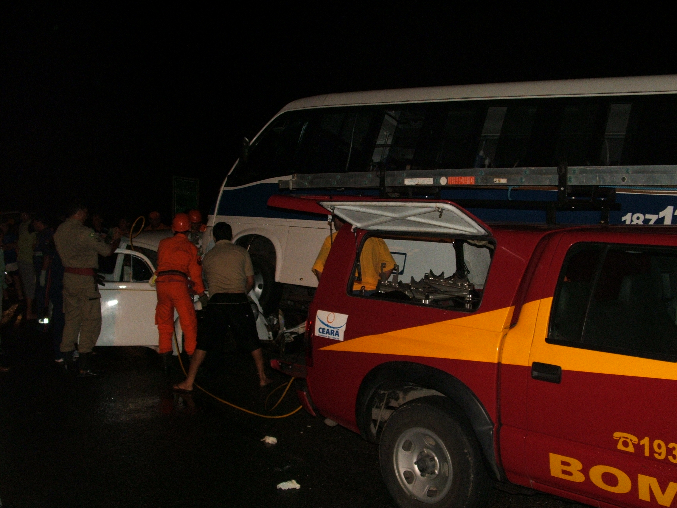 Bombeiro utilizando máquina de desencarceramento